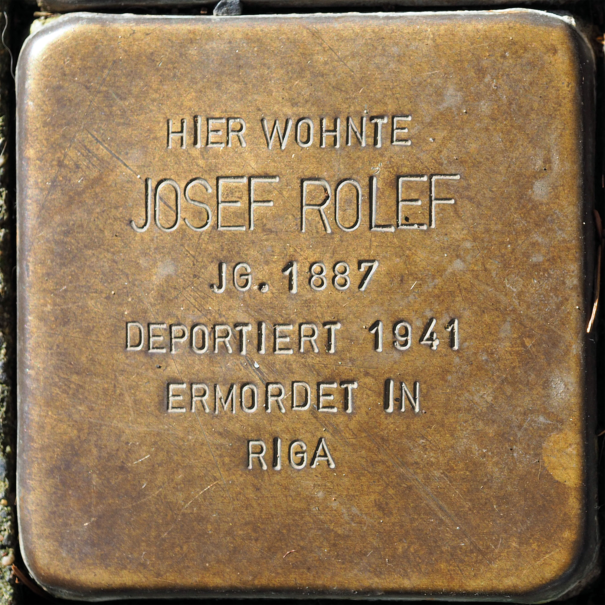 Stolpersteine MG: Rolef, Josef